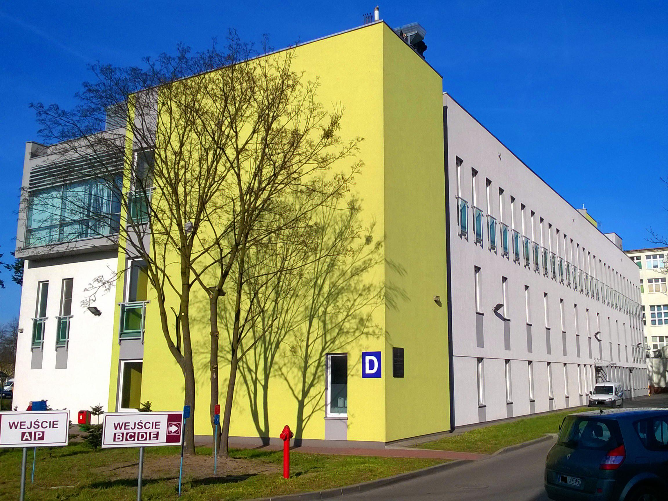 Szpital Miejski w Toruniu8